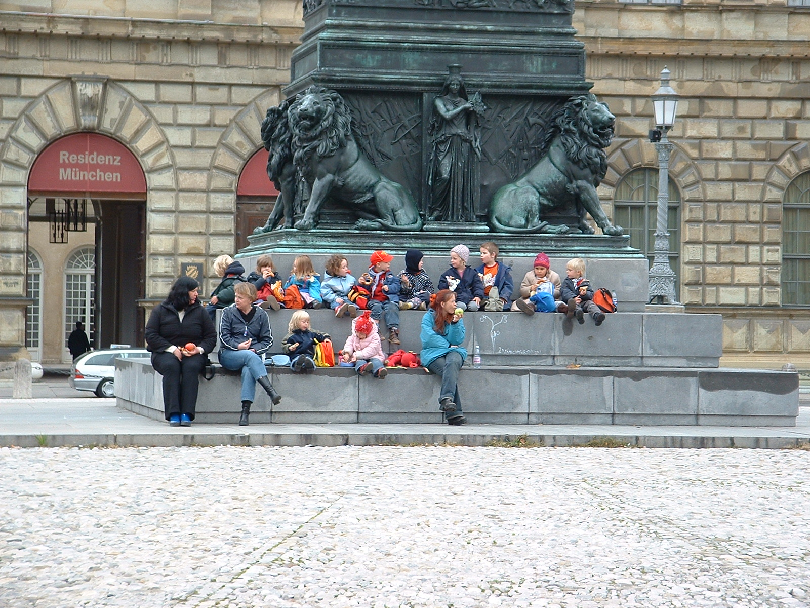 Pause beim Kindergartenausflug (Max-Joseph-Denkmal München).